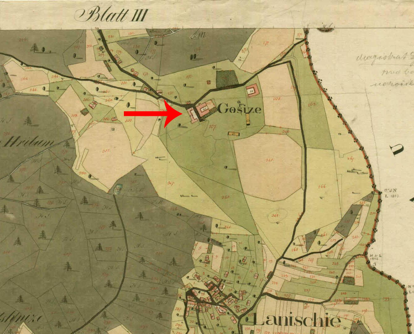 Franciscejski kataster za Kranjsko, 1823-1869